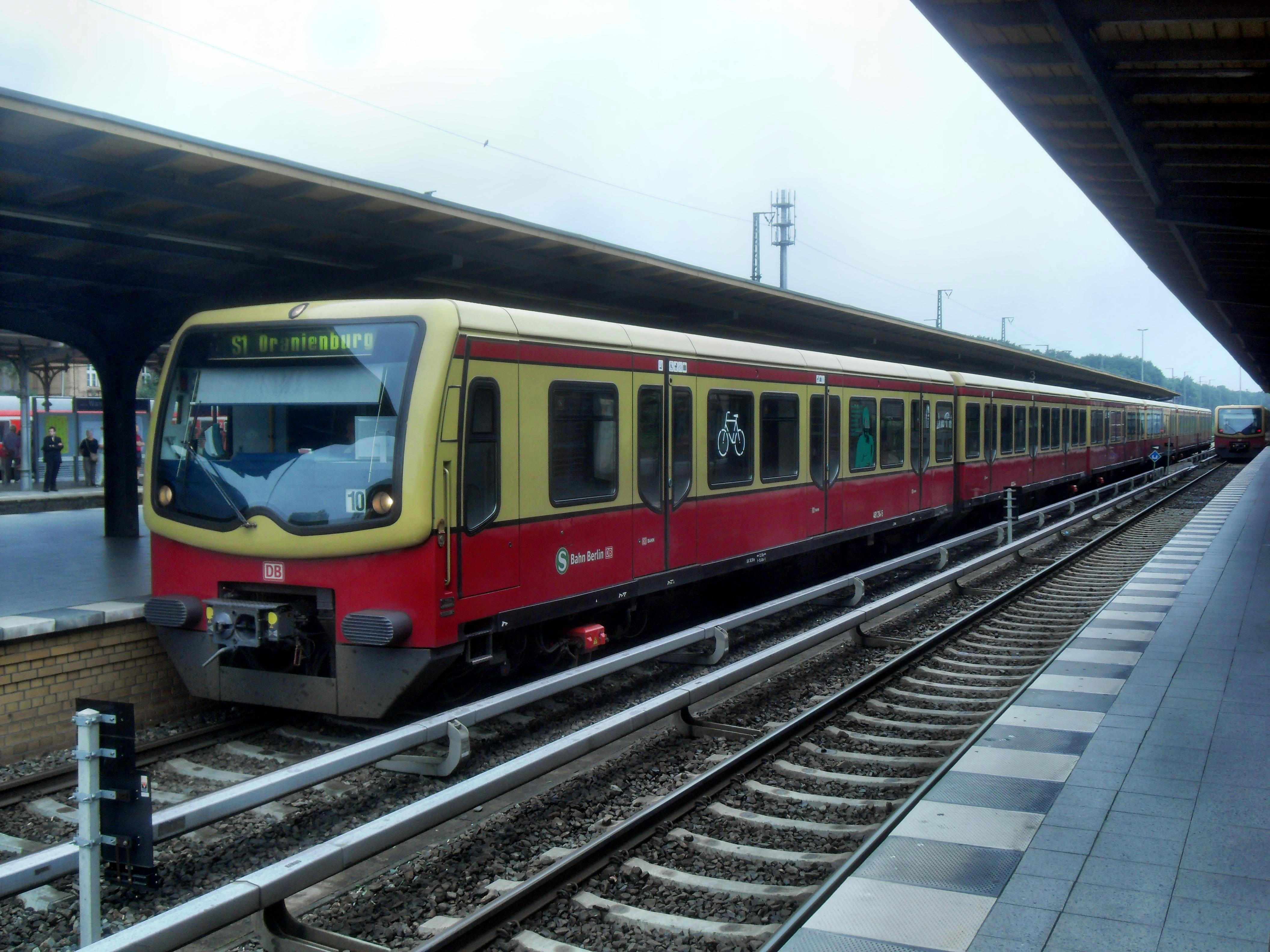 Triebwagen der DBAG-Baureihe 481 der S-Bahn Berlin auf der Linie S 1 im Bahnhof Wannsee auf dem Weg nach Oranienburg in Deutschland